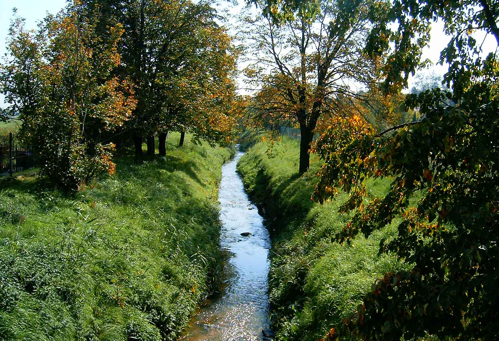 Az Aranyhegyi-patak Ürömnél (Pest megye, Magyarország)